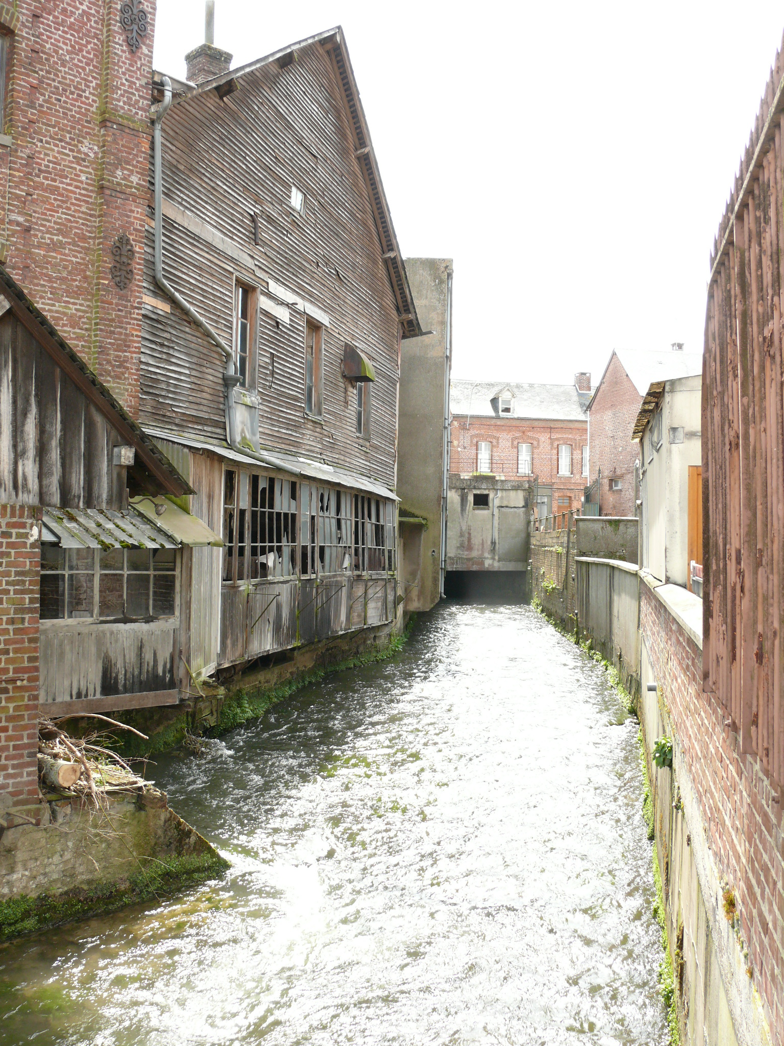 Aumale (Seine-Maritime, France) - La Bresle le long du Moulin du Roy